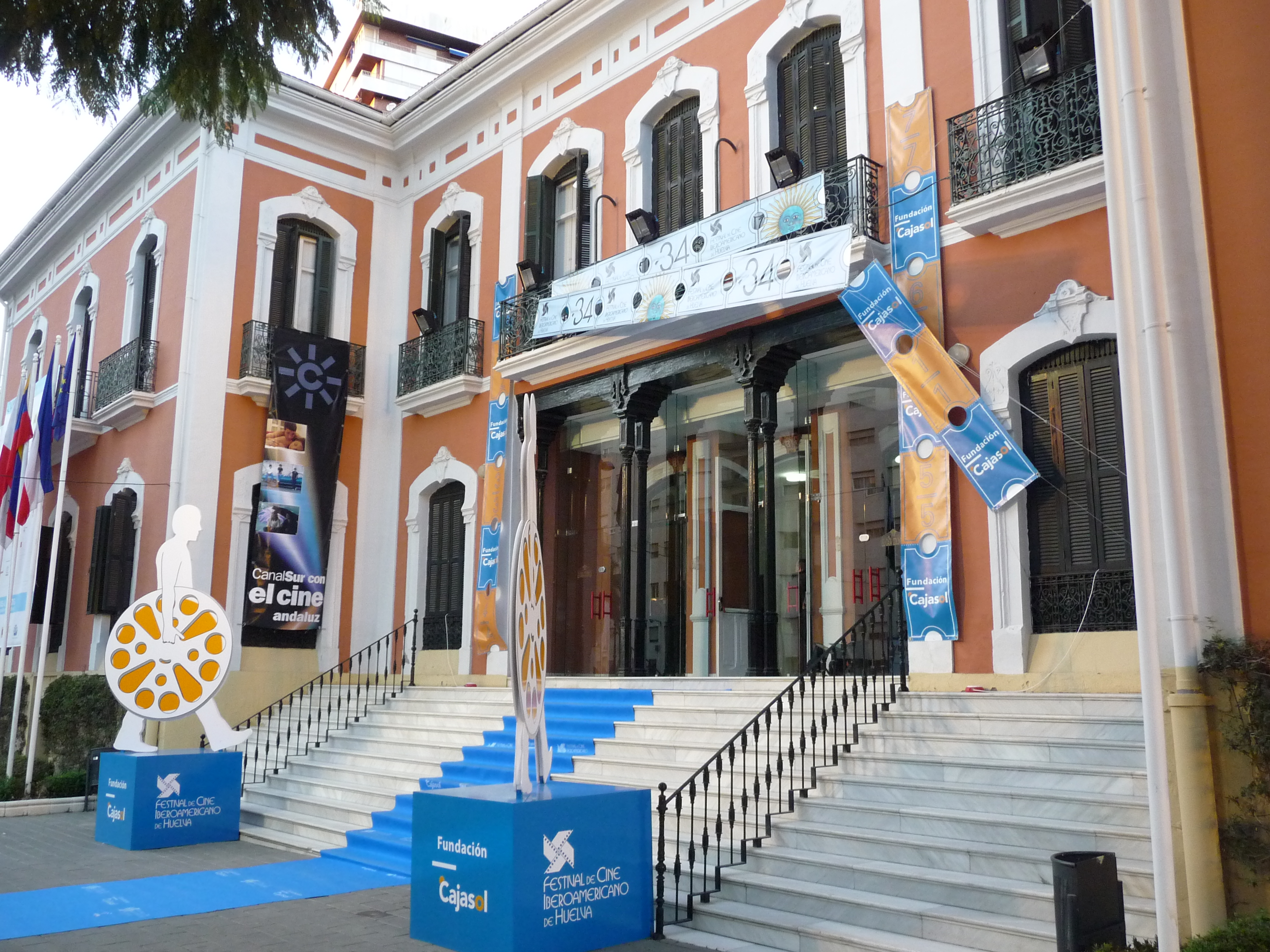 Festival iberoamericano de cine de Huelva (España).